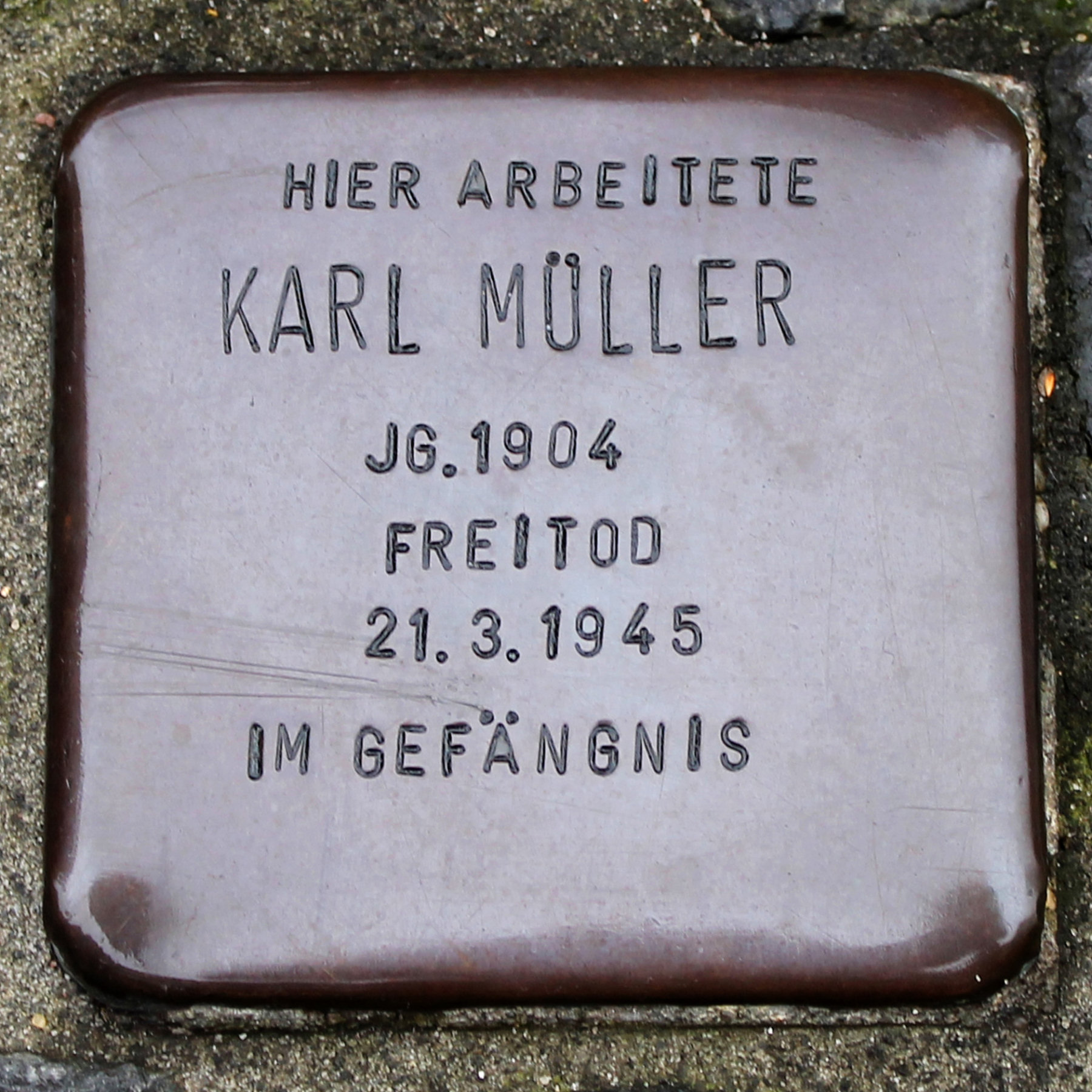 Stolperstein für Karl Müller, Huttenstraße 12 (Betriebsgelände der Siemens AG Gasturbinenwerk Berlin), Berlin-Moabit